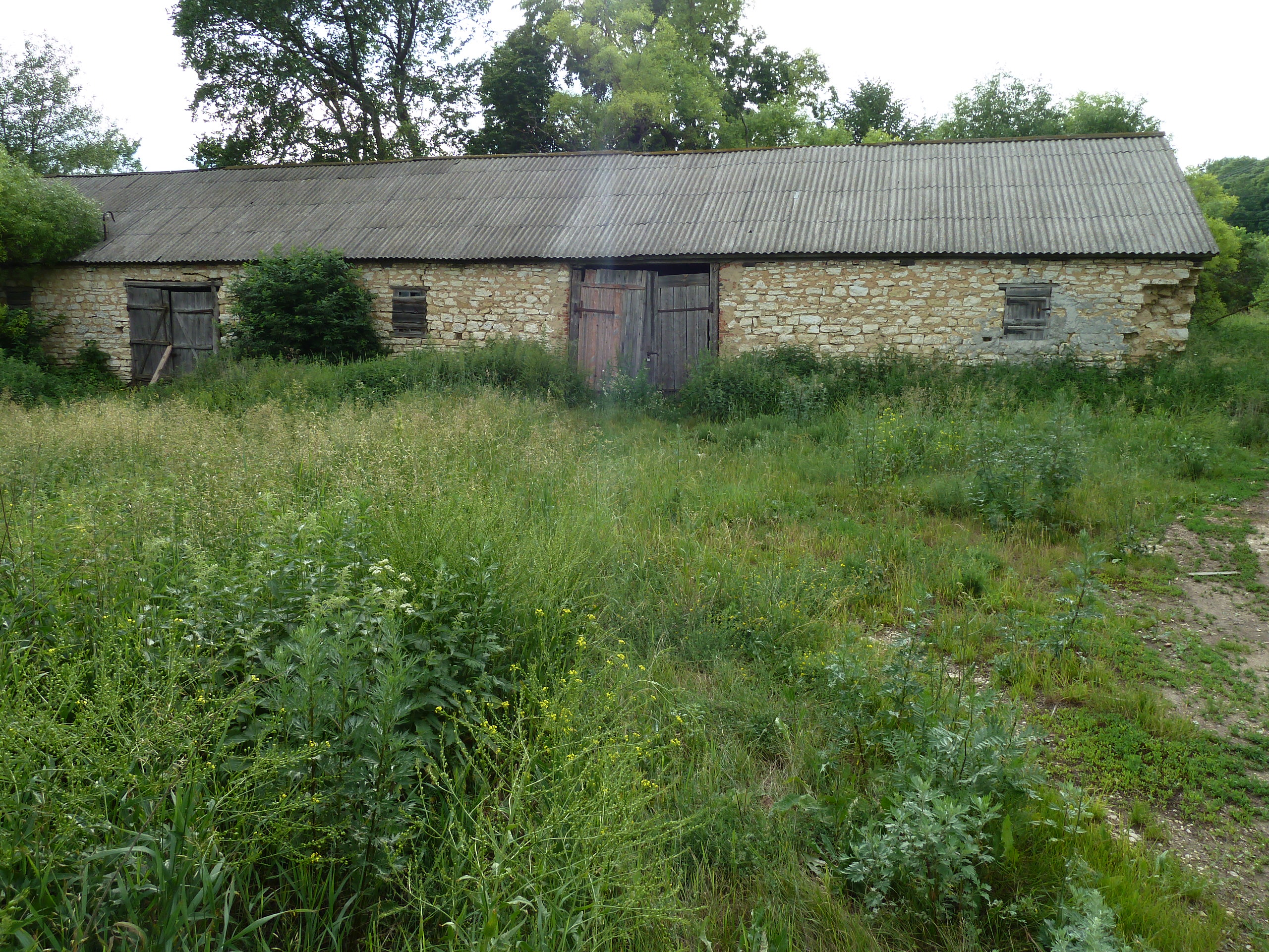 Здесь на мельнице когда-то "кипела" жизнь